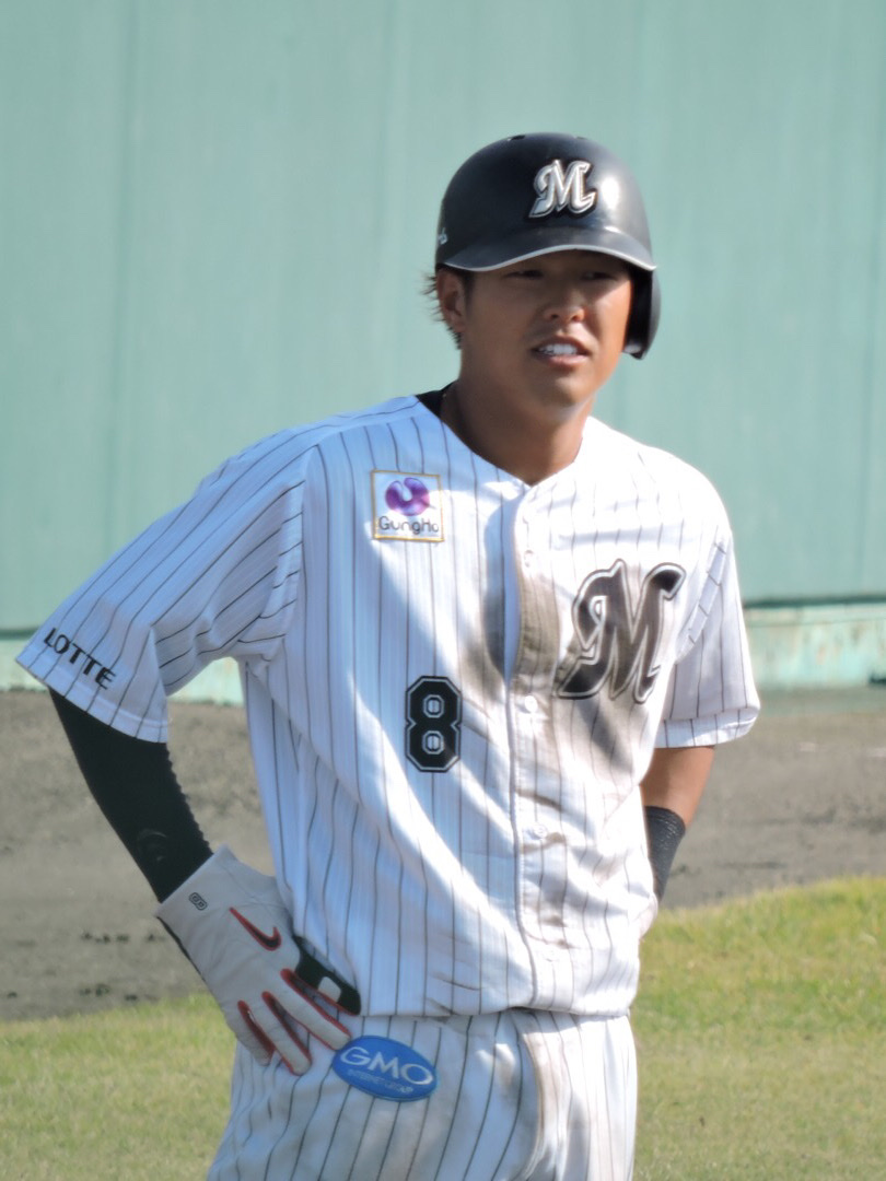 中村奨吾 2018年